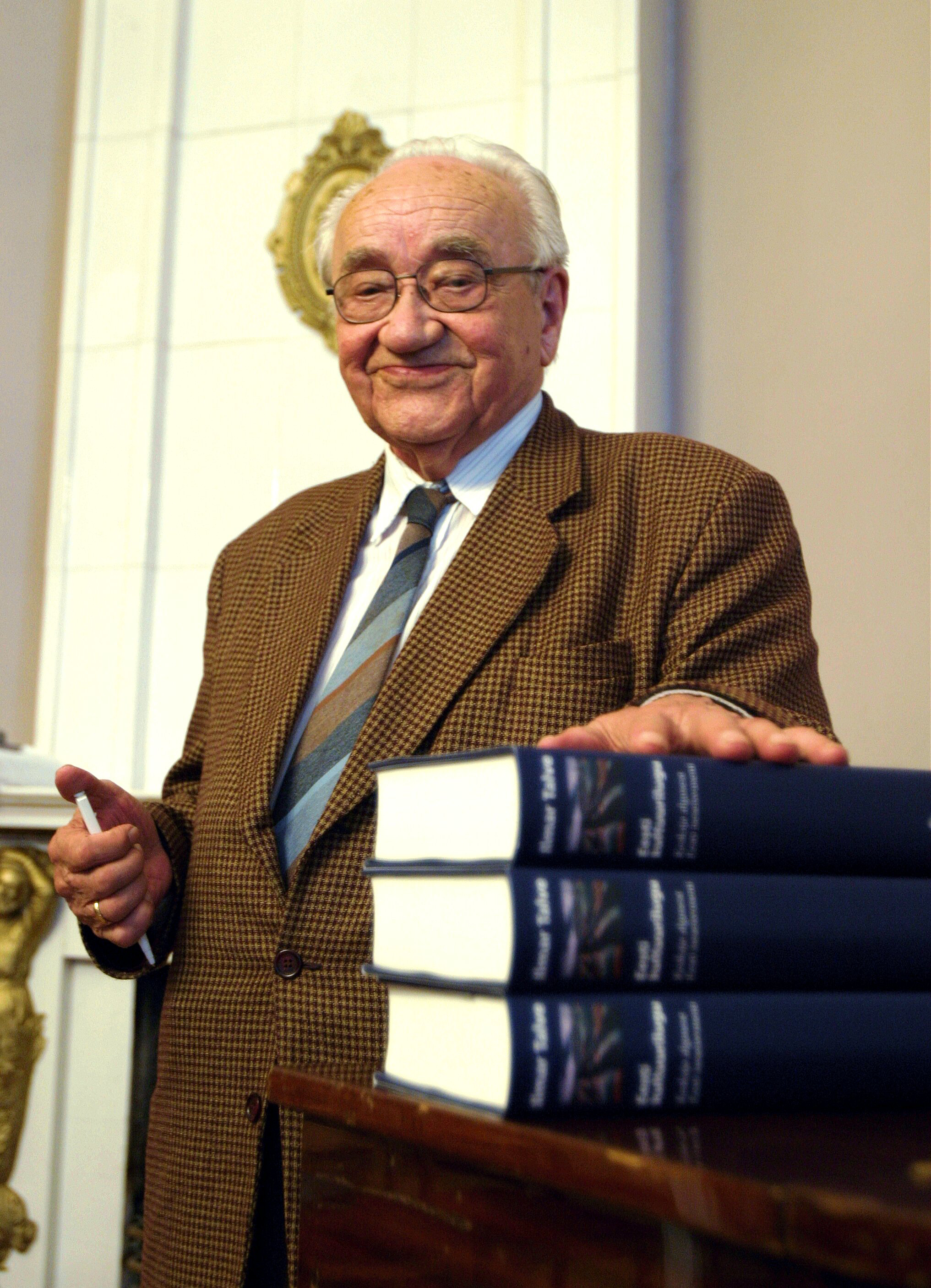 Ilmar Talve 8. juunil 2004 Tartu Kirjanike Majas oma raamatu "Eesti kultuurilugu" esitlusel.